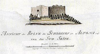 Alteni ordulinnus XIX sajandi algul. Vaade edela- ja kaguküljele.